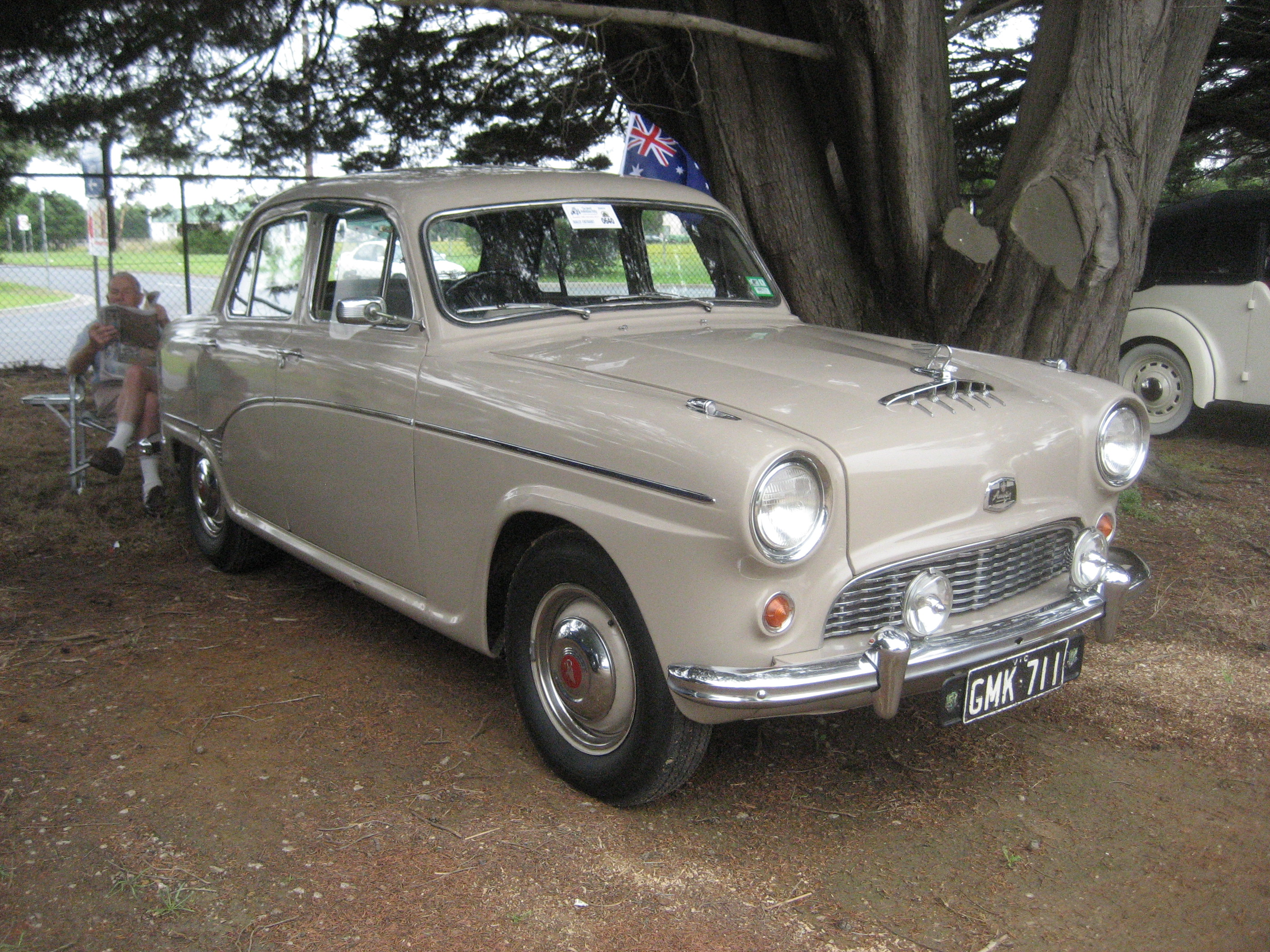 Large 6 cyl Saloon (Cambridge; Mid size 4 cyl) Engine; 2600cc 6 cyl